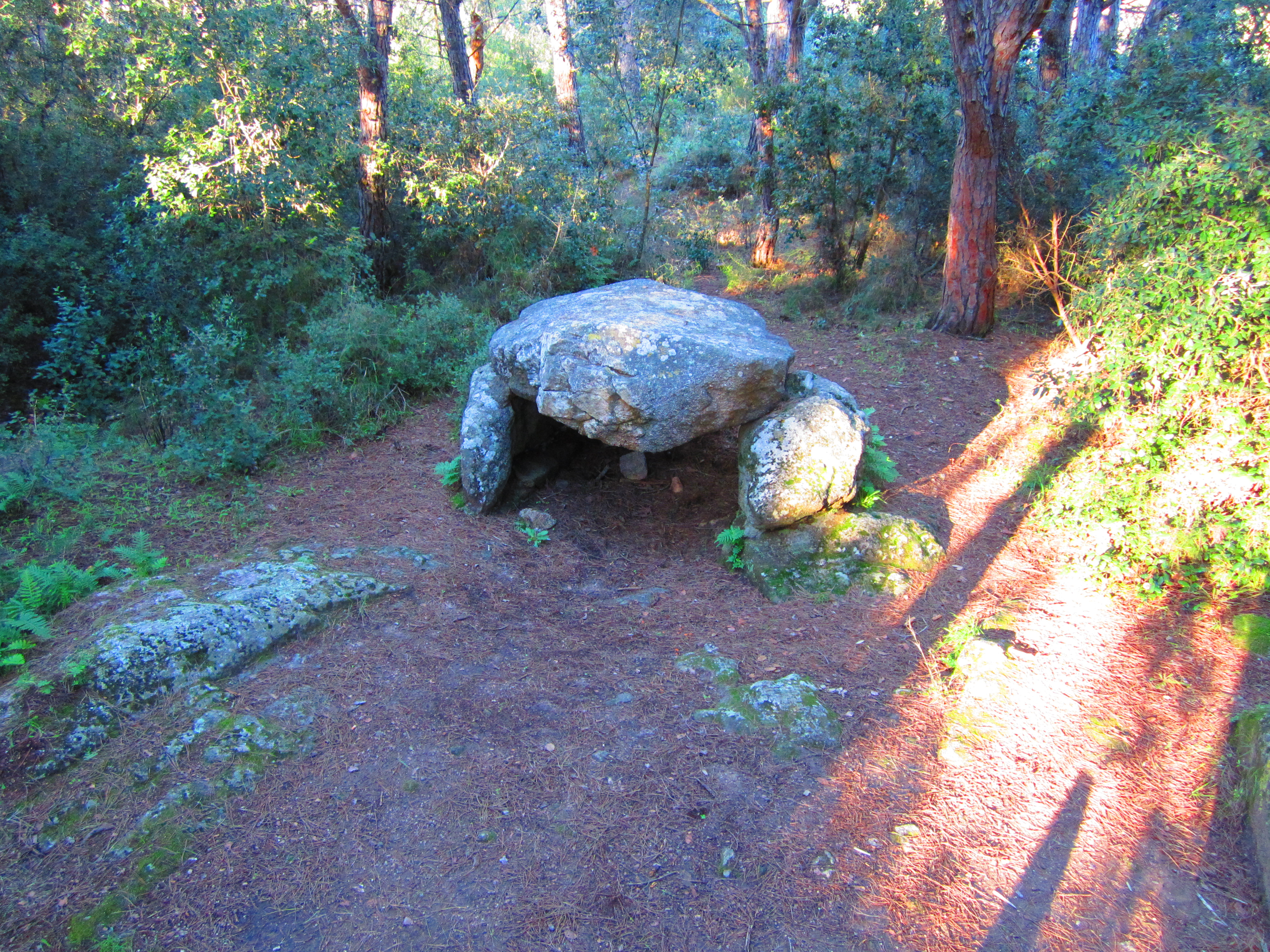 Fotografia del dolmen de Can Mina dels Torrents vist des de la cara de migjorn.